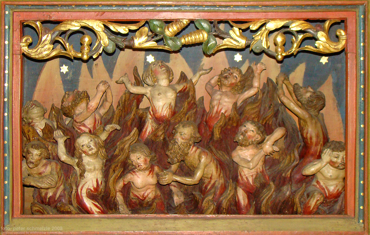 Predella am Hochaltar der Stadtkirche Bad Wimpfen